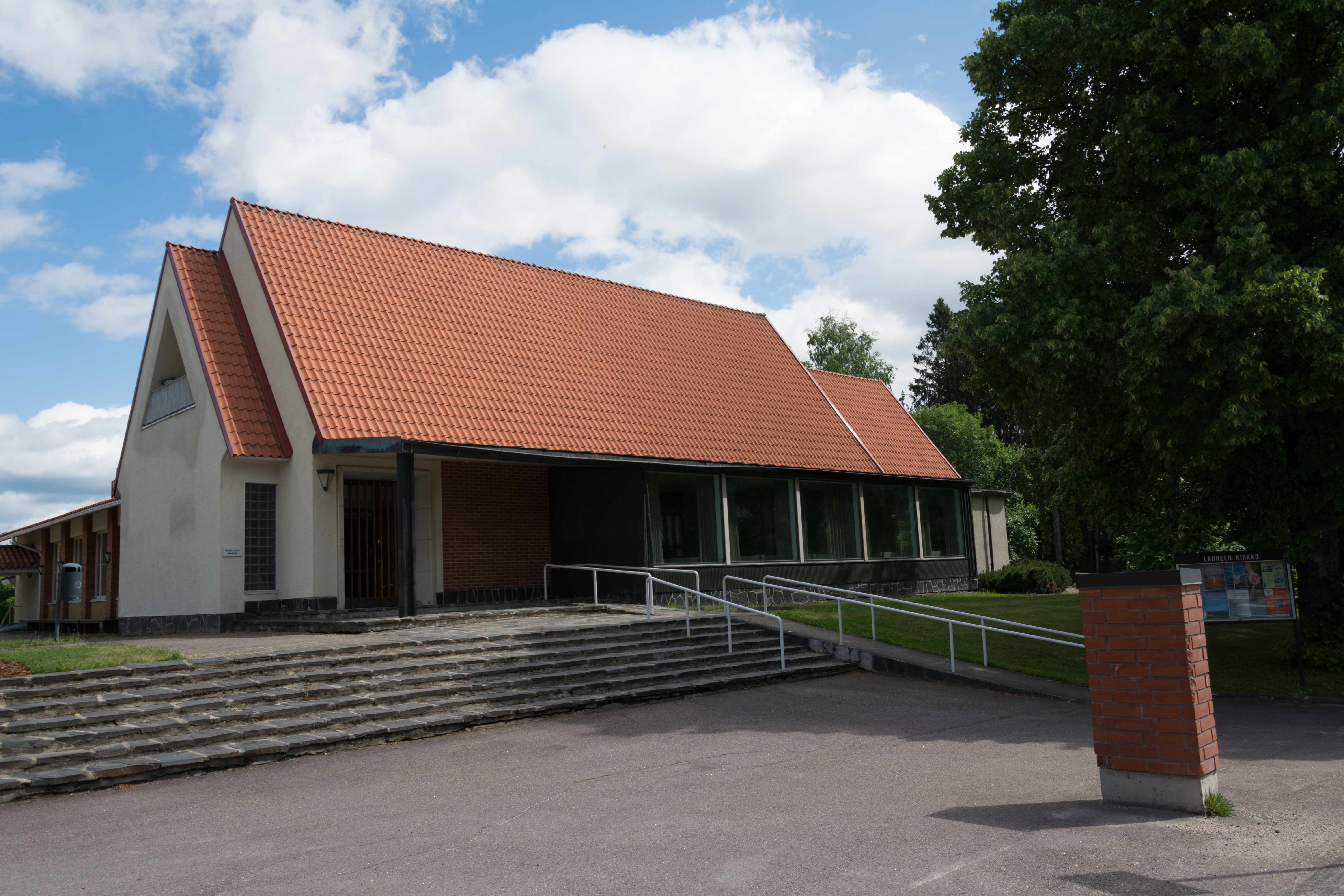 Launeen kirkko Lahdessa on valmistunut vuonna 1953, ja sen ovat suunnitelleet arkkitehdit Elma ja Erik Lindroos.